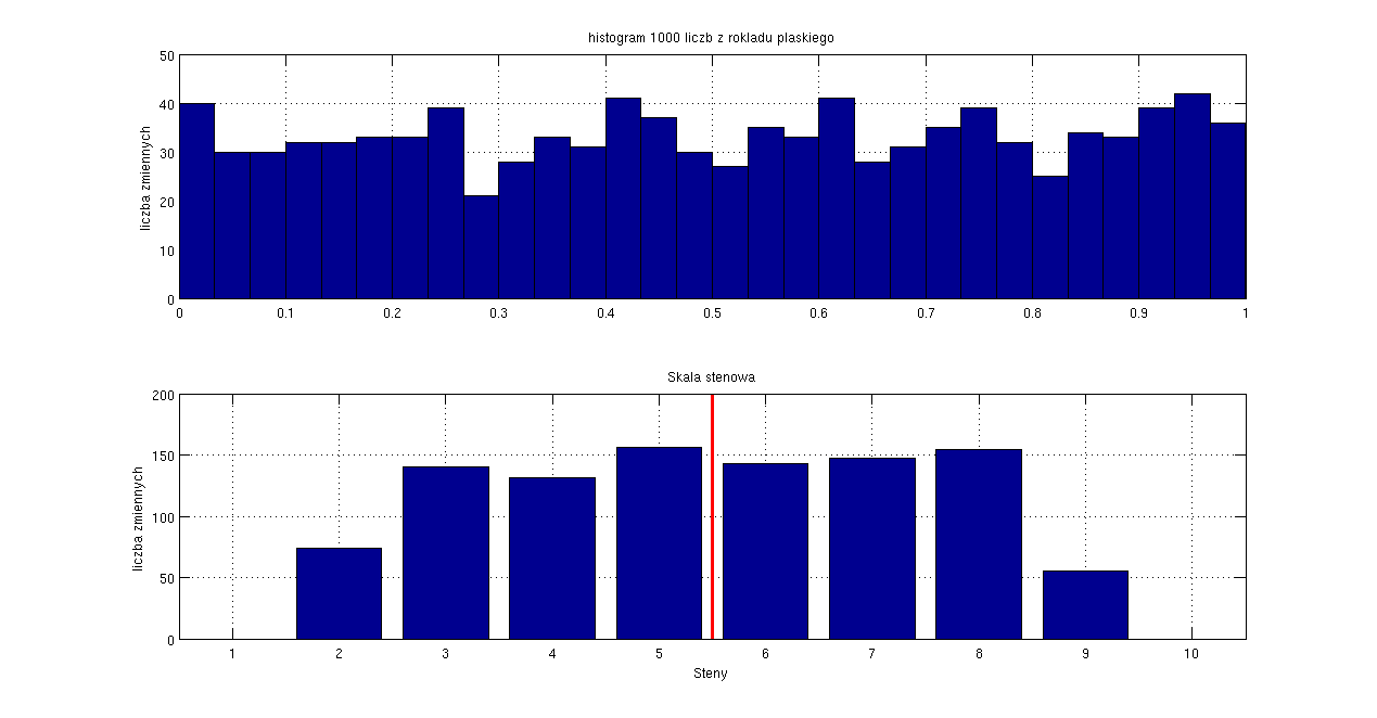 Grafika przedstawia na pierwszym wykresie 'surowe dane' wylosowane z rozkładu płaskiego, na drugim te same dane w skali stenowej. Autor grafiki: Grzegorz Knor